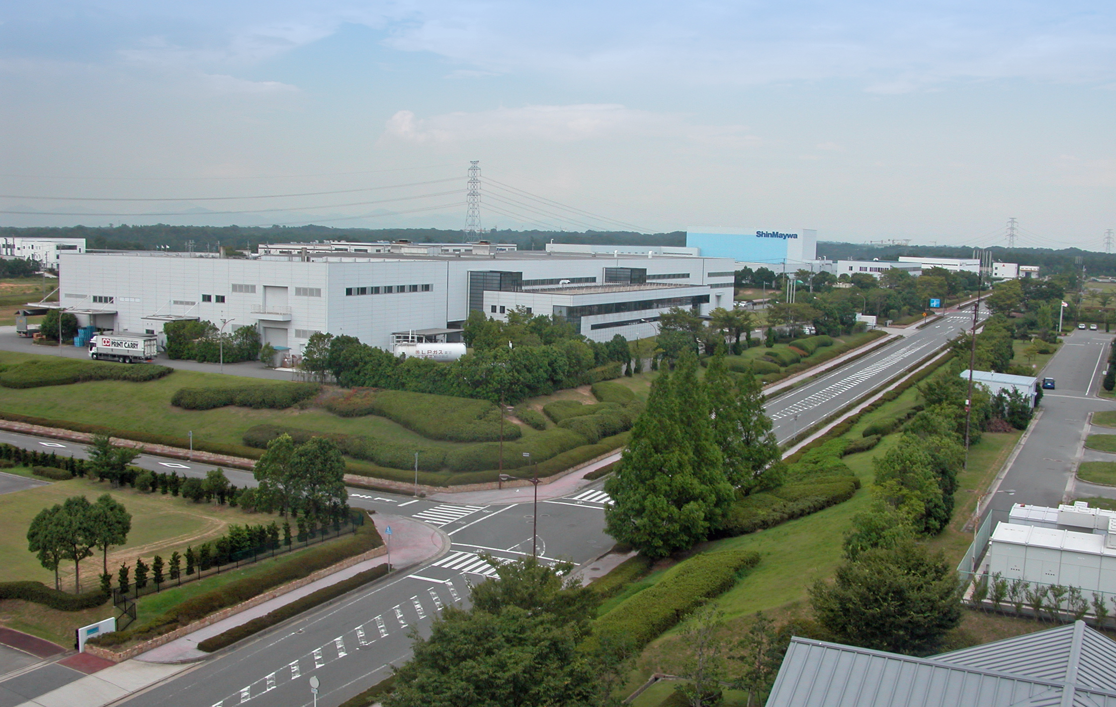 小野市匠台工業団地